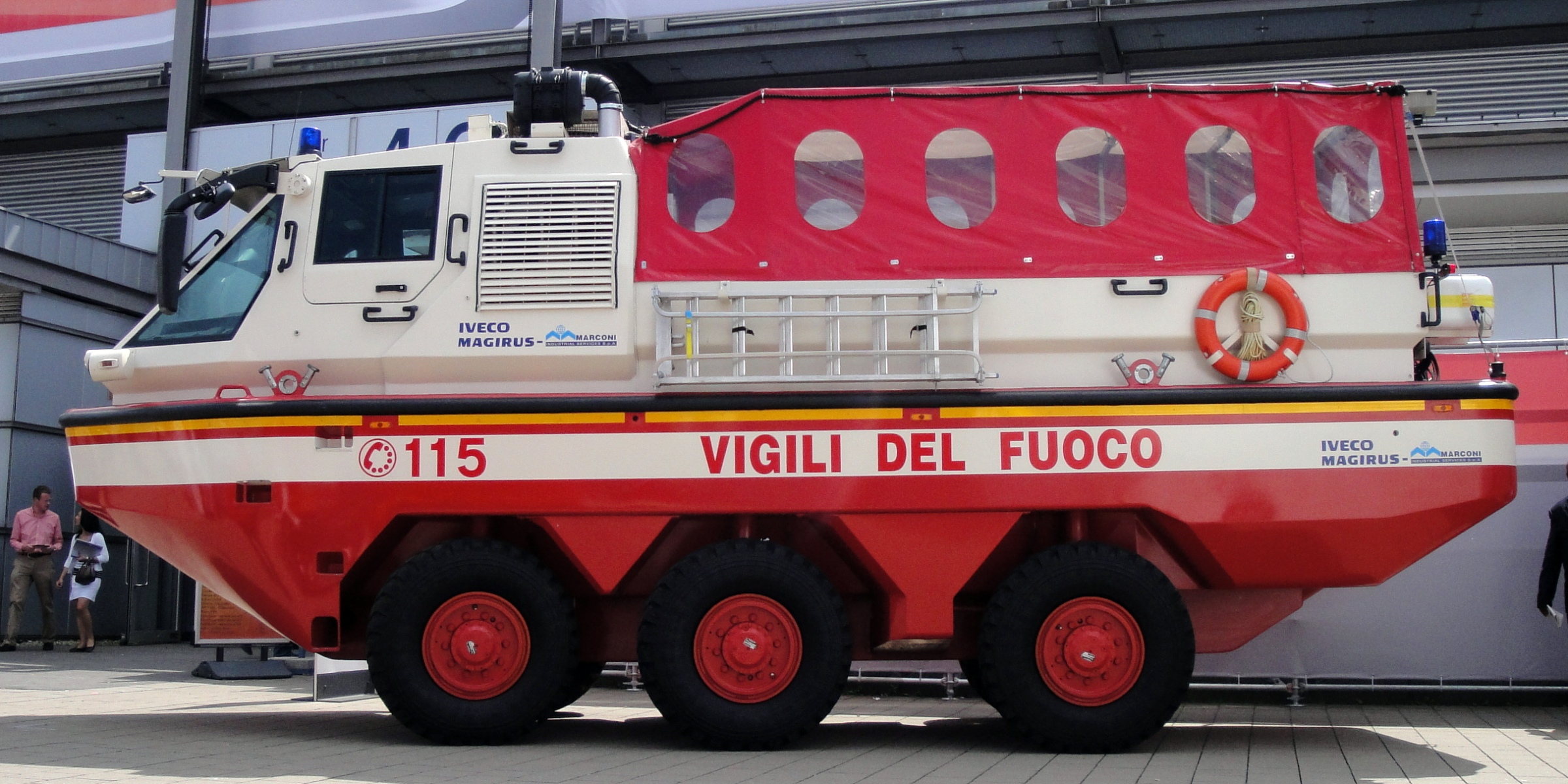 Amphibienfahrzeug Iveco Magirus Marcony Duffy, Interschutz 2010